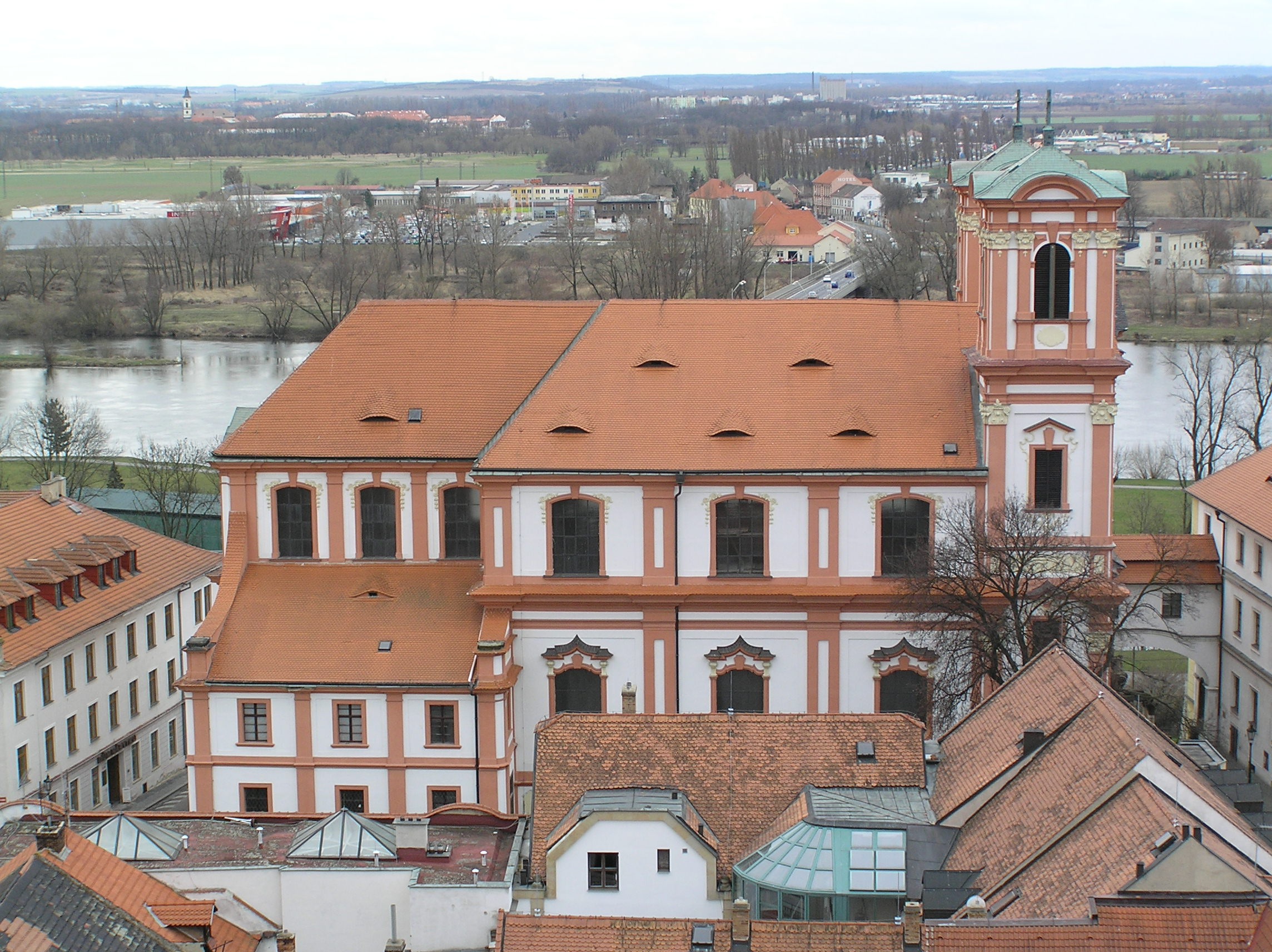 Kostel jezuitský, Zvěstování P. Marie (Litoměřice), Jezuitská 1/20, Litoměřice